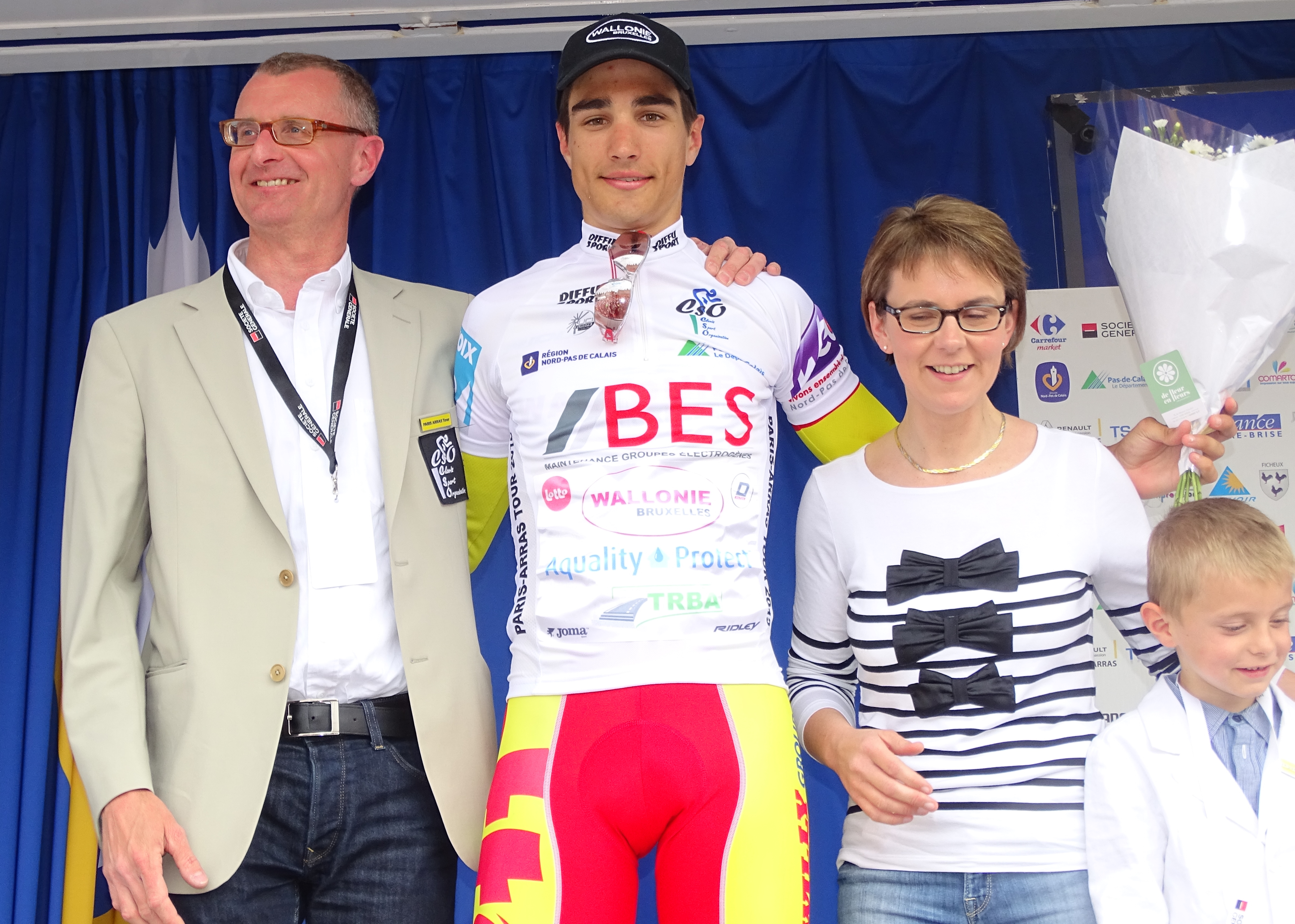 Reportage réalisé le dimanche 24 mai 2015 à l'occasion du départ et de l'arrivée de la troisième étape du Paris-Arras Tour 2015 à Arras, Pas-de-Calais, Nord-Pas-de-Calais, France.